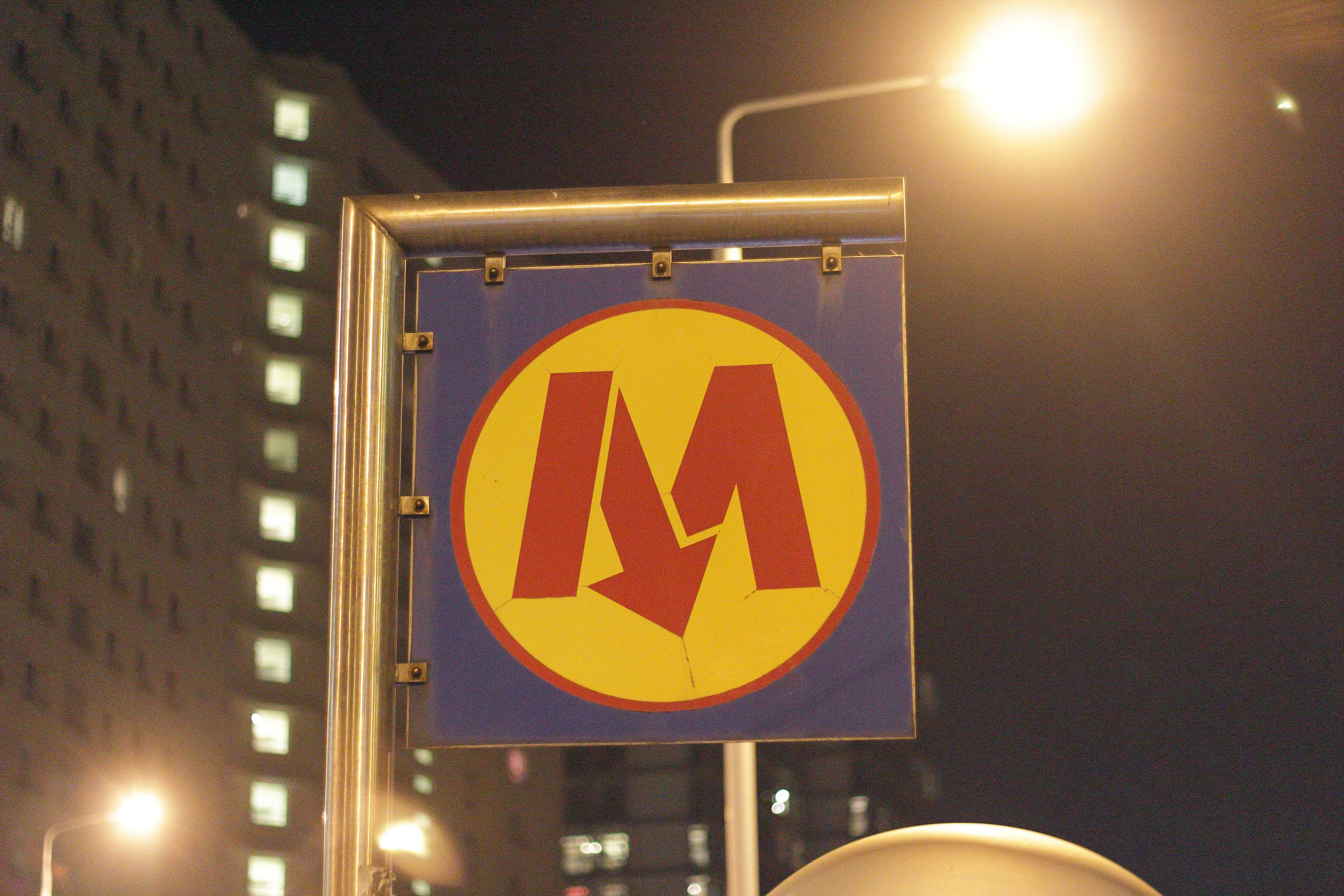 Znak Metra Warszawskiego przy wejściu na stację A17 Dworzec Gdański.